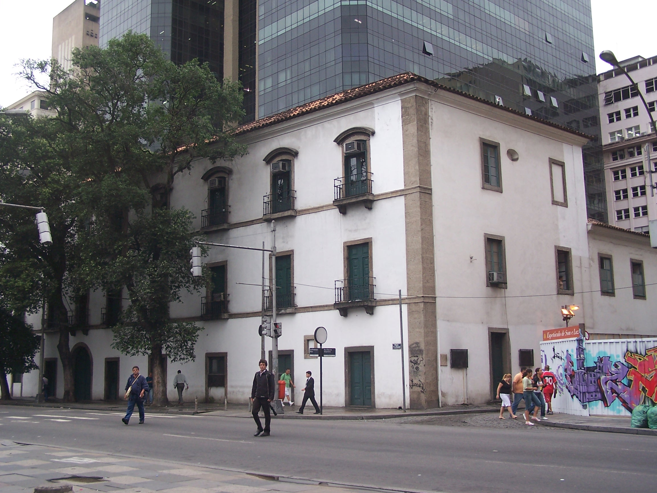 Carmo Convent in Rio de Janeiro, Brazil